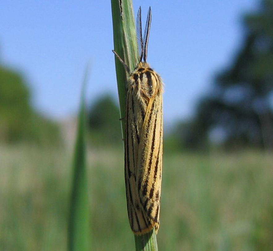 Gestreifter Grasbär (Spiris striata), Groß Machnow, Brandenburg